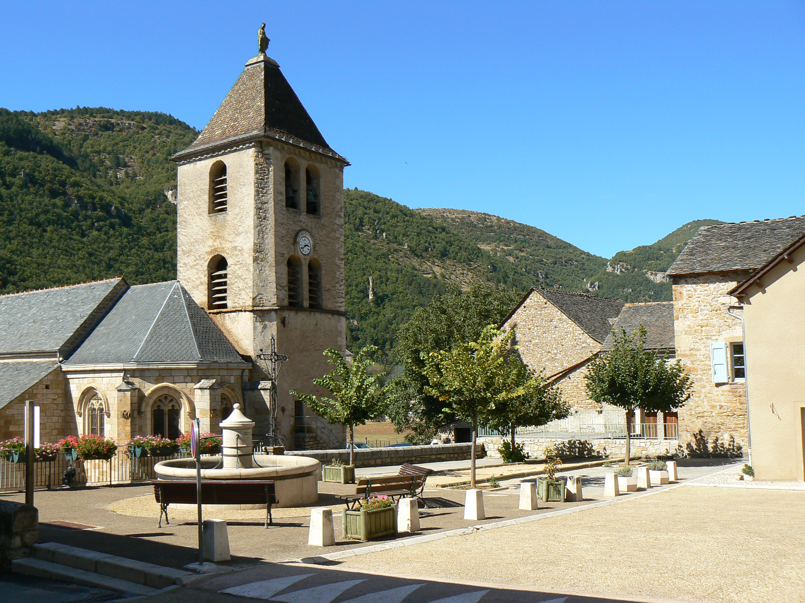 Place de l'église à Quézac en Lozère